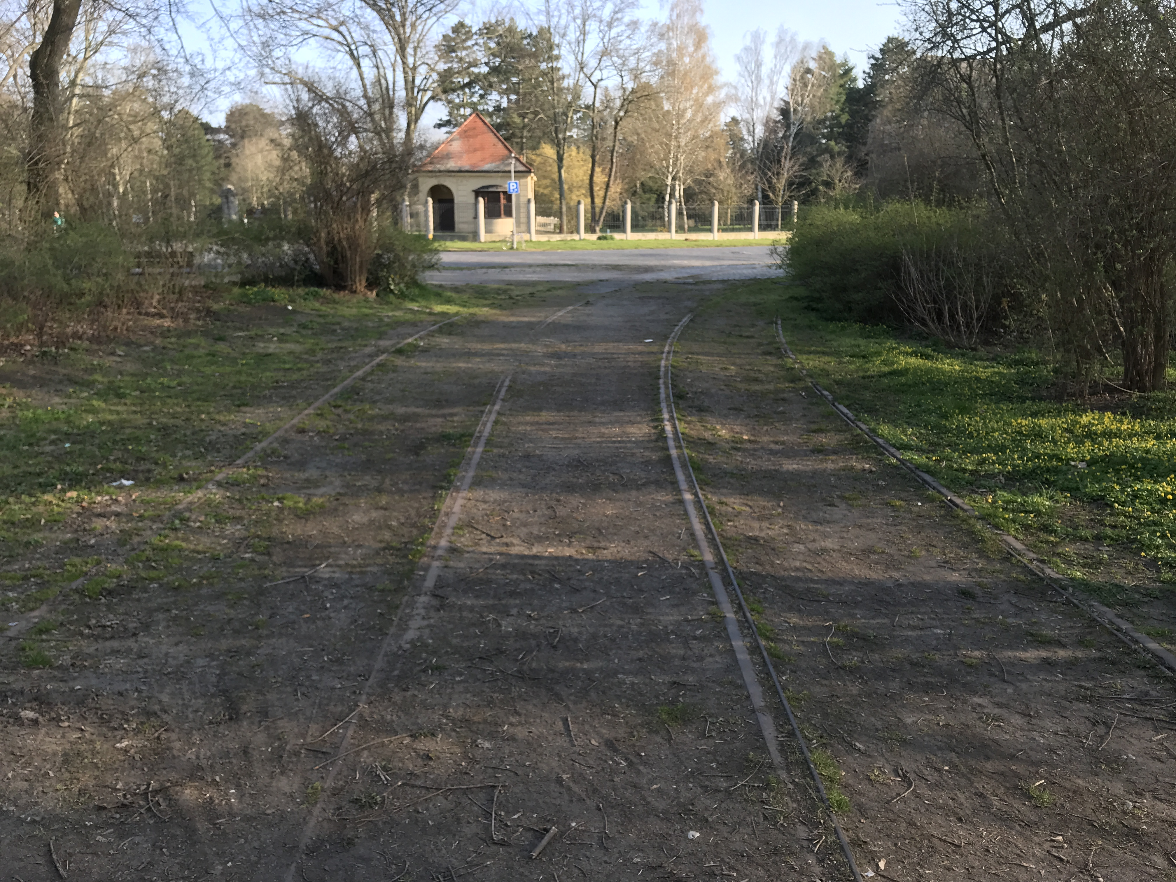 Aufgegebene Straßenbahngleise am Leipziger Südfriedhof (Wendeschleife Tabaksmühle)